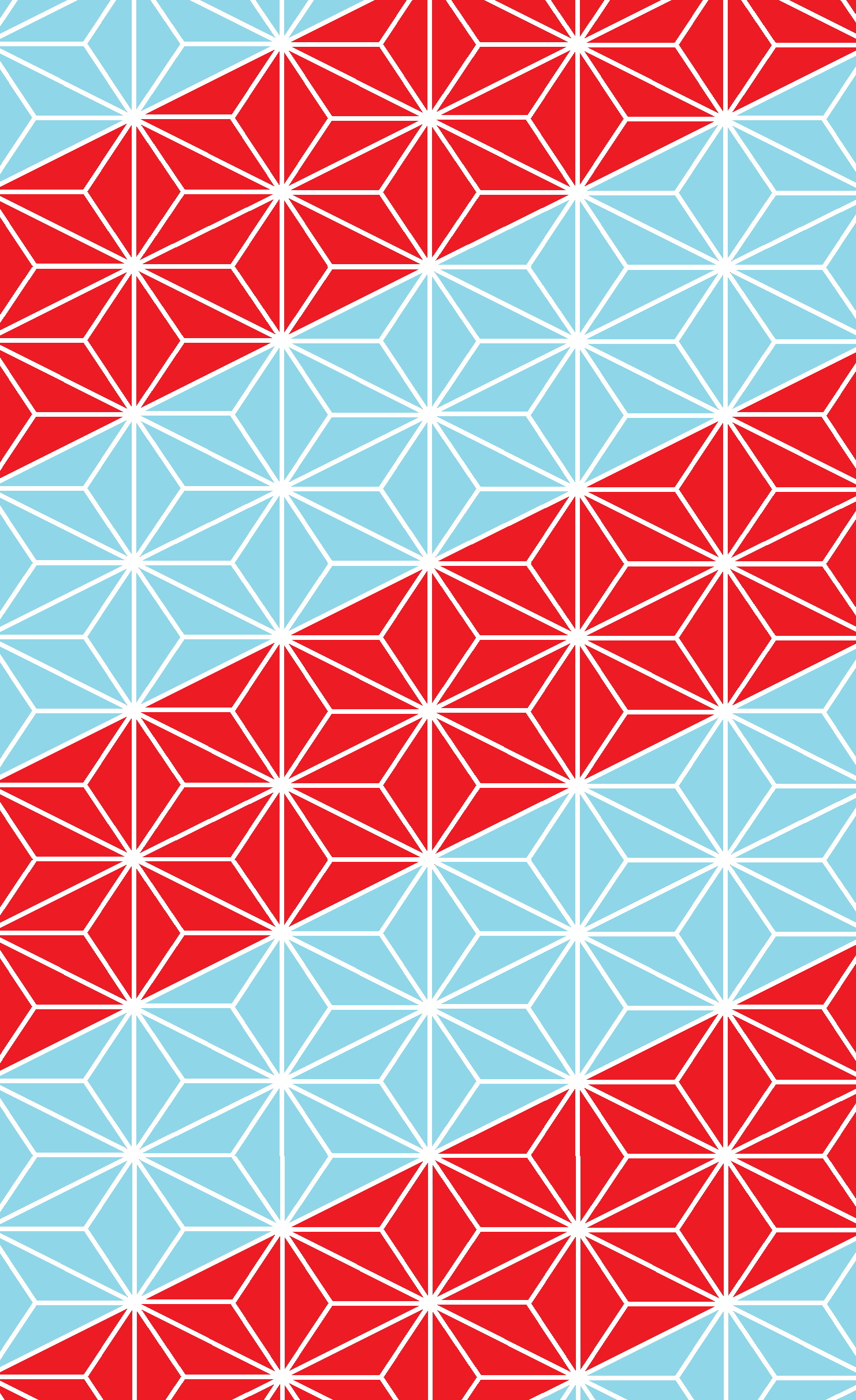 麻の葉段鹿子文様